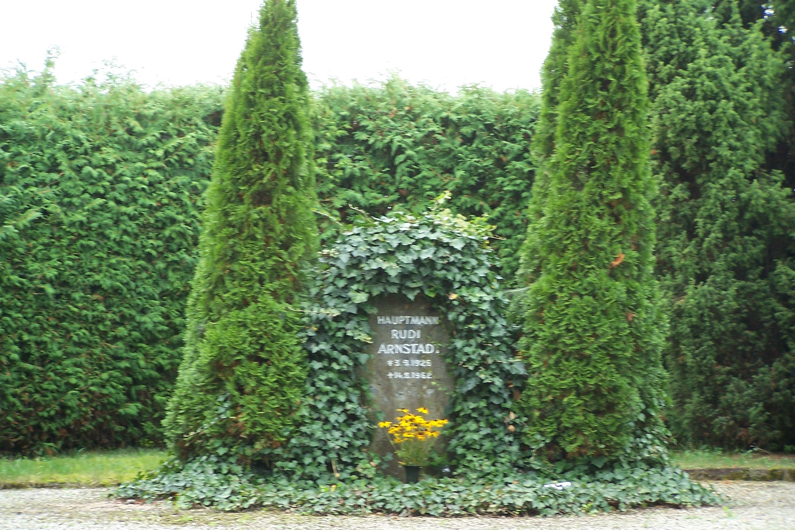 Das Rudi-Arnstadt-Denkmal für einen DDR-Grenzer in der Ortslage Wiesenfeld.